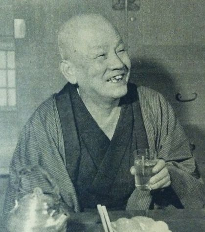 五代目古今亭志ん生